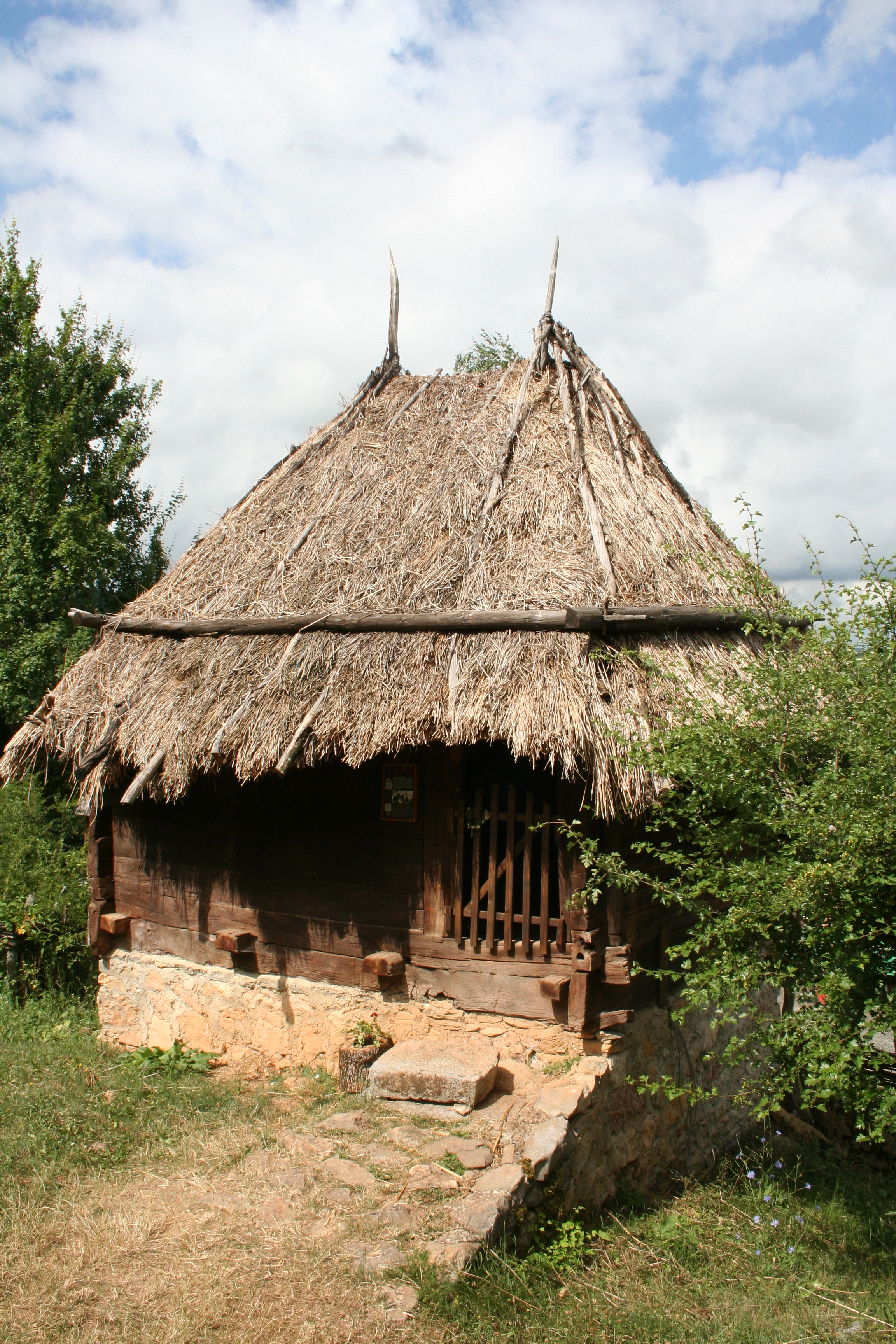 Muzej na otvorenom "Staro selo" Sirogojno